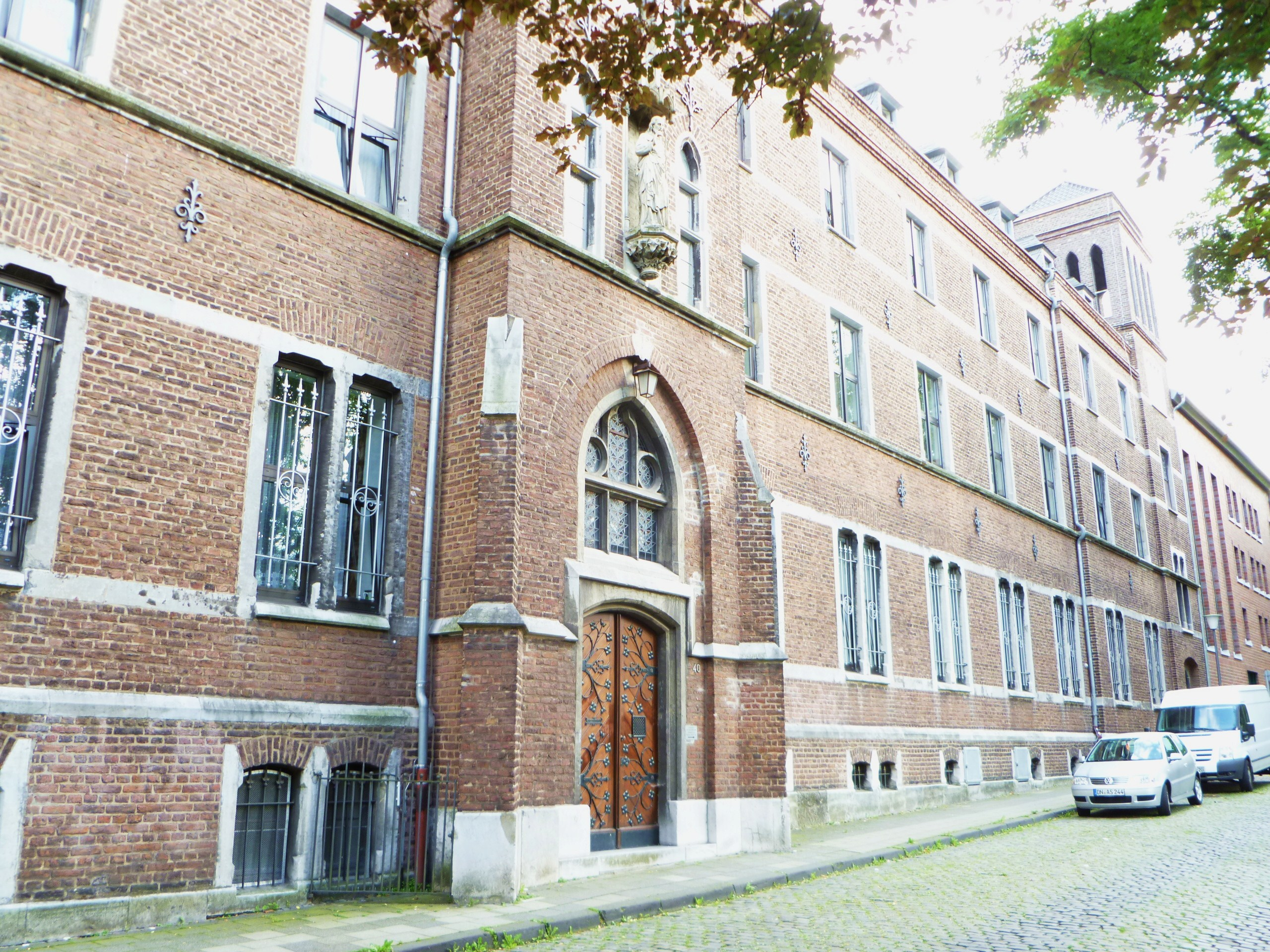 Gebäudedenkmal Michaelsbergstraße 40; Kloster der Schwestern vom armen Kinde Jesu - Mutterhaus der deutschen Niederlassungen